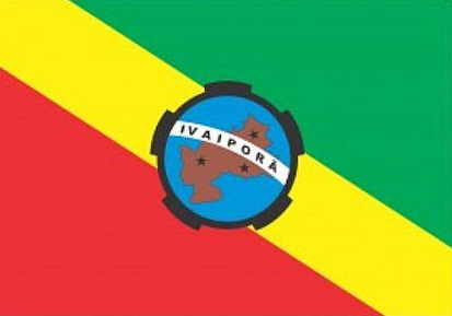 Bandeira